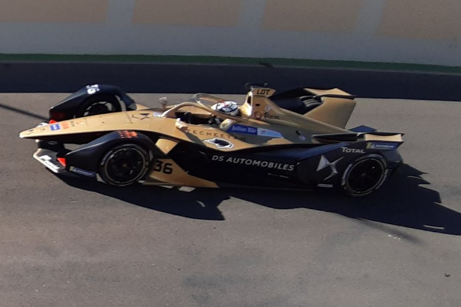 André Lotterer beim Marrakesch E-Prix 2019